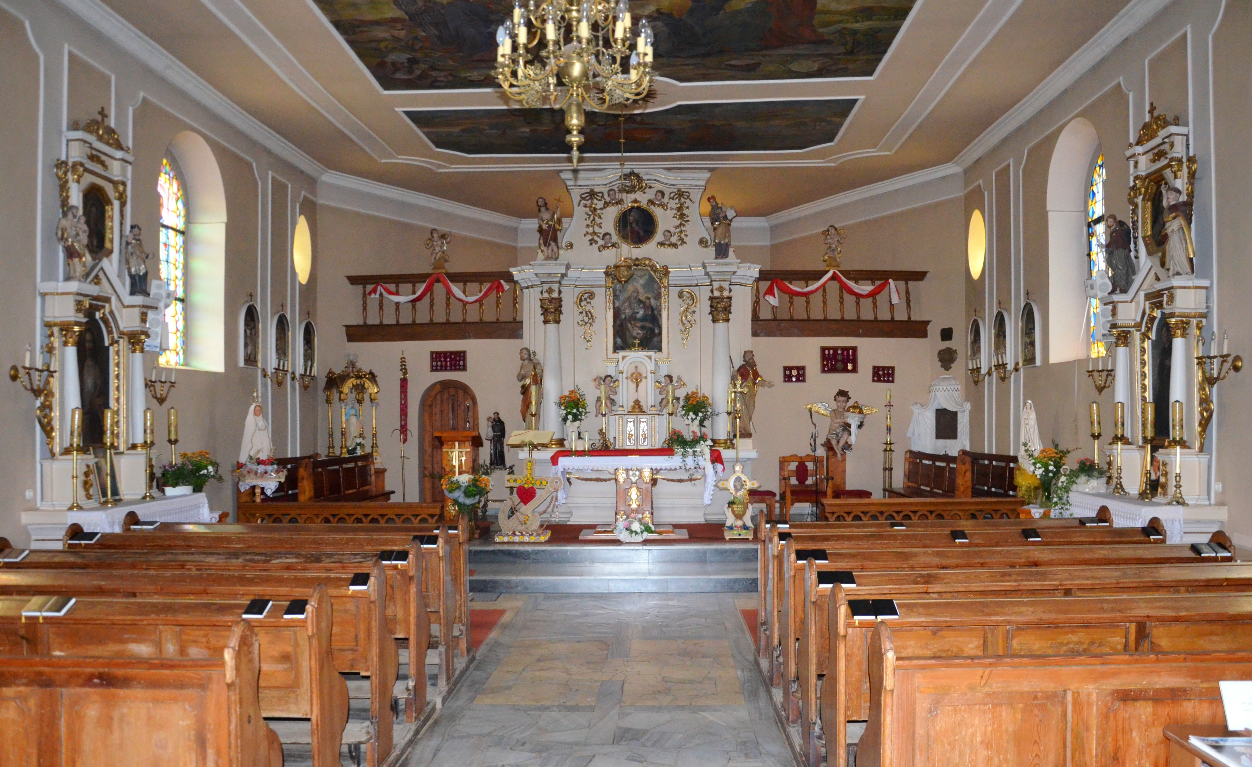 Rożnowo, kościół par. p.w. św. Katarzyny, 1798